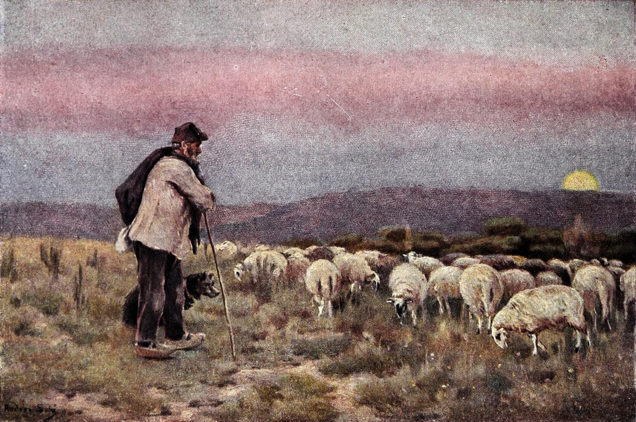 El pastor (1901), obra de Andreu Solá Vidal.